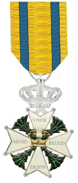 Scan van een kruis in mijn verzameling. De zilveren kroon en het lint zijn tekenwerk Robert Prummel